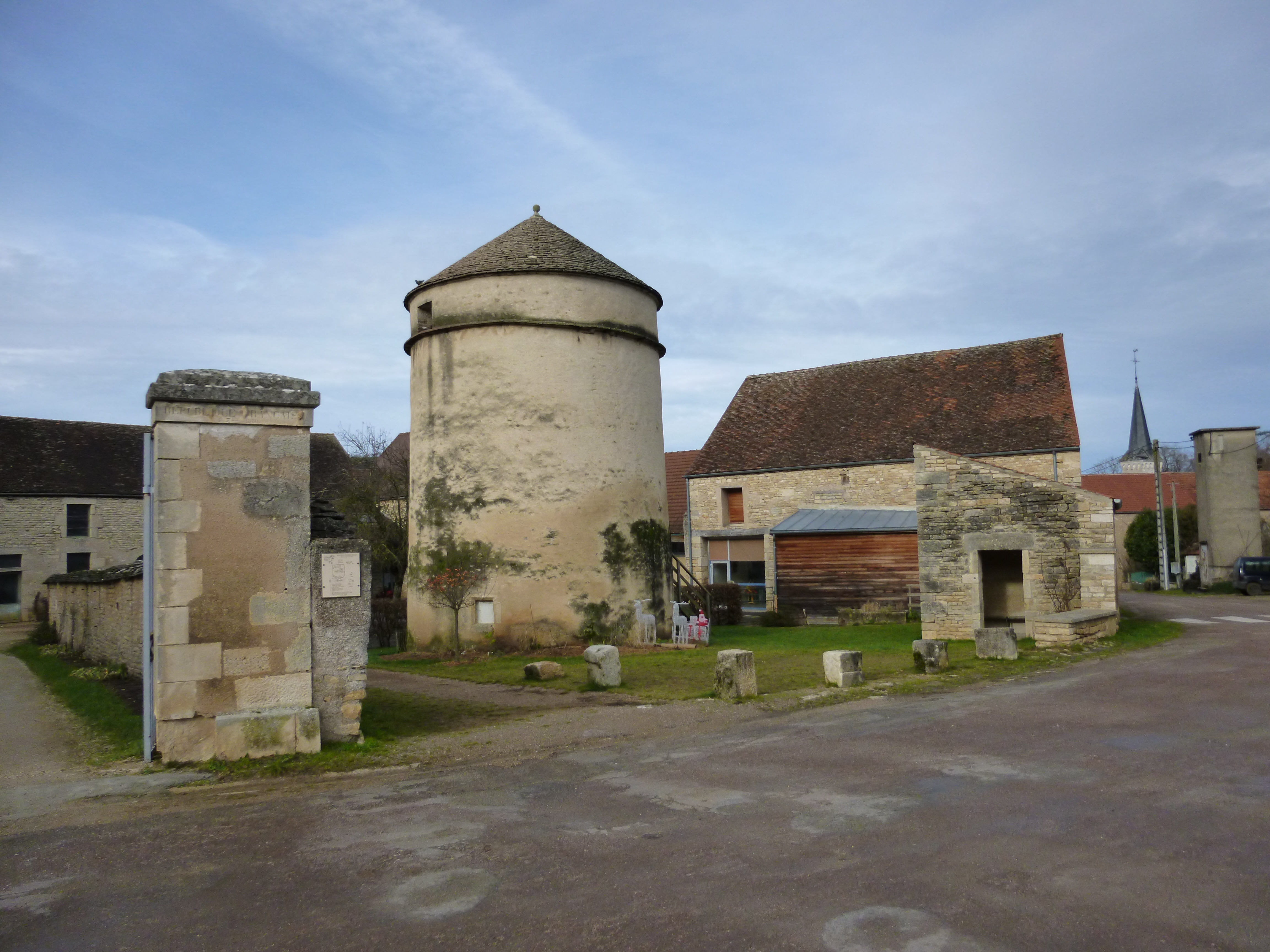 senailly, sur la place du village : le pigeonnier et l'école maternelle